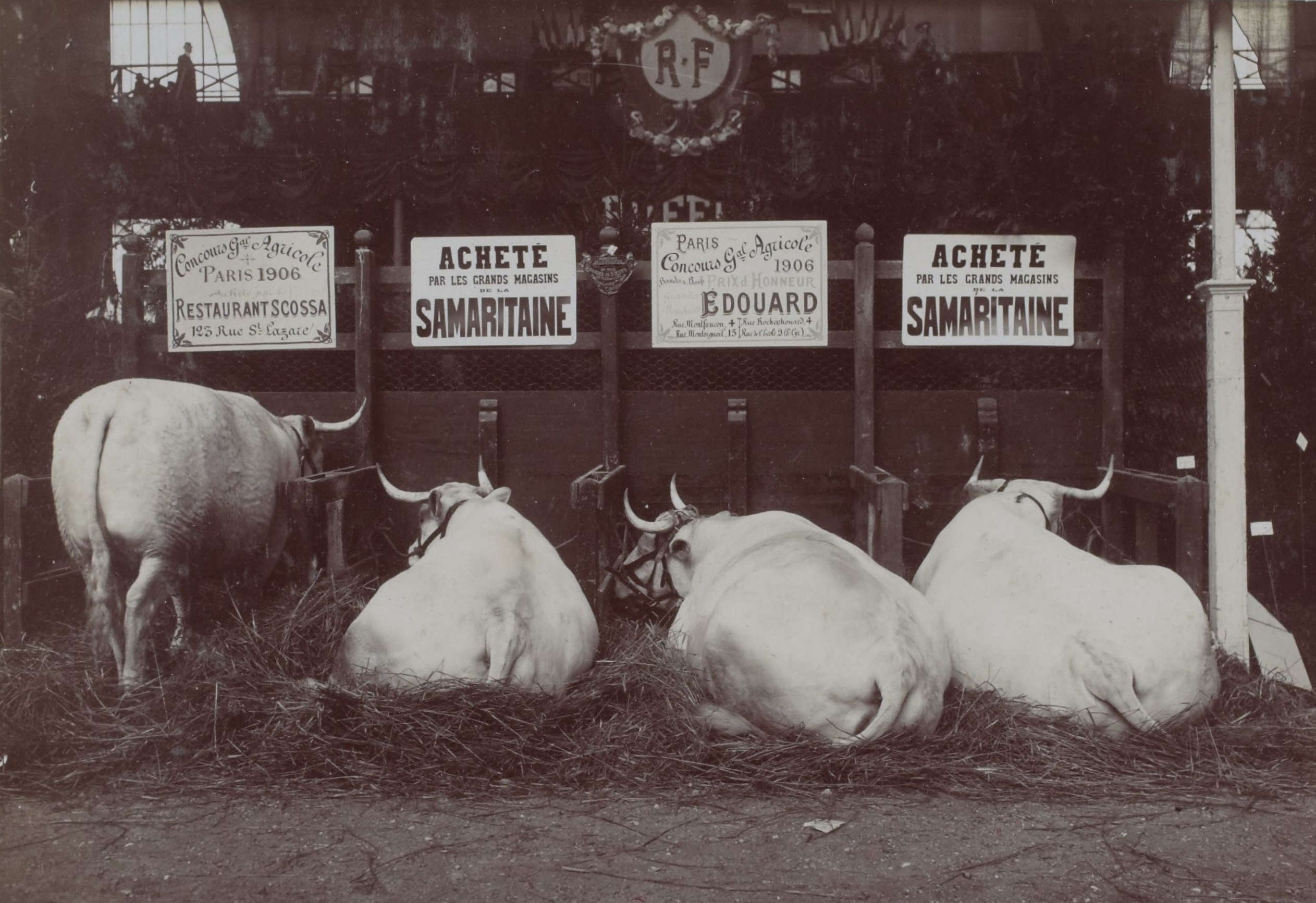 [Collection Jules Beau. Photographie sportive] : T. 31. AnnÃ©es 1905 et 1906 / Jules Beau : F. 35. Concours agricole, 17 mars 1906